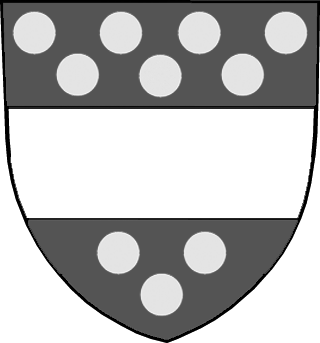 Vapensköld för frälseätten Bagge av Botorp